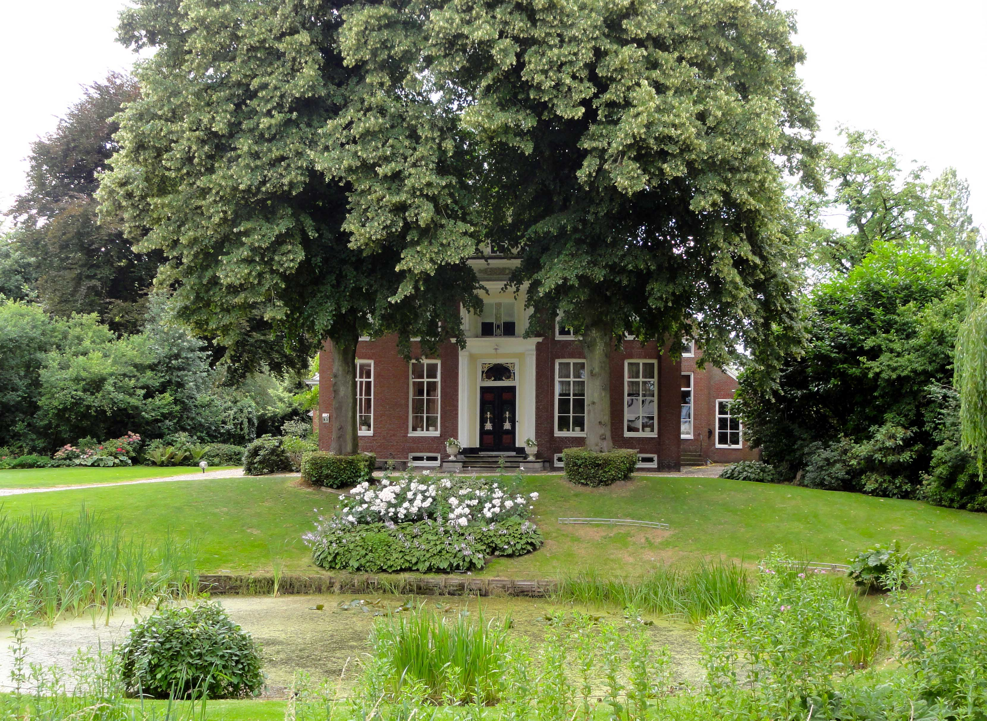 Oldambster boerderij Zuiderstraat 63 Noordbroek